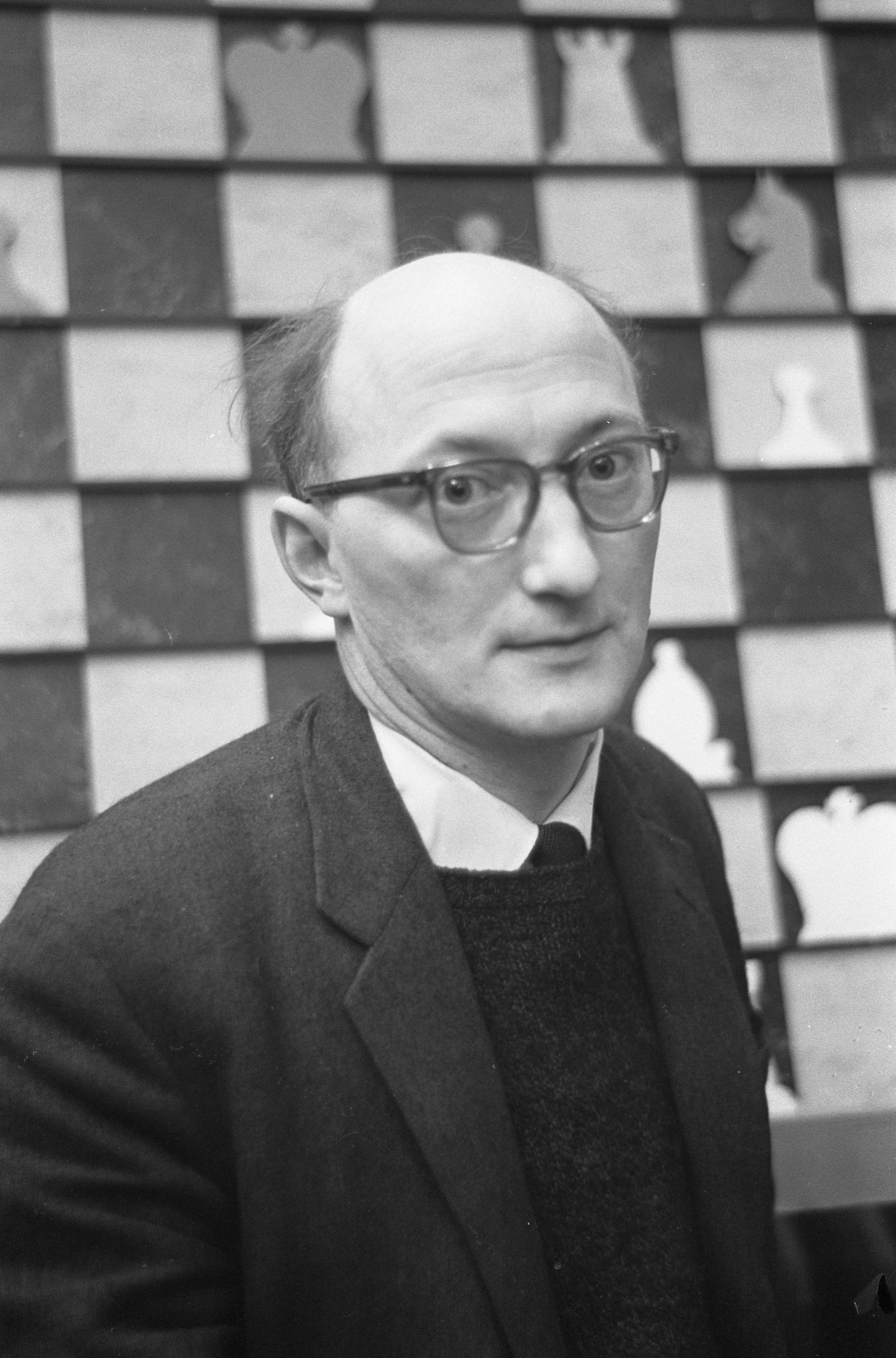 Collectie / Archief : Fotocollectie Anefo Reportage / Serie : [ onbekend ] Beschrijving : Laatste dag Hoogovensschaaktoernooi. Van Scheltinga Datum : 21 januari 1962 Trefwoorden : schaken Instellingsnaam : Hoogovenschaaktournooi Fotograaf : Pot, Harry / Anefo Auteursrechthebbende : Nationaal Archief Materiaalsoort : Negatief (zwart/wit) Nummer archiefinventaris : bekijk toegang 2.24.01.05 Bestanddeelnummer : 913-4236